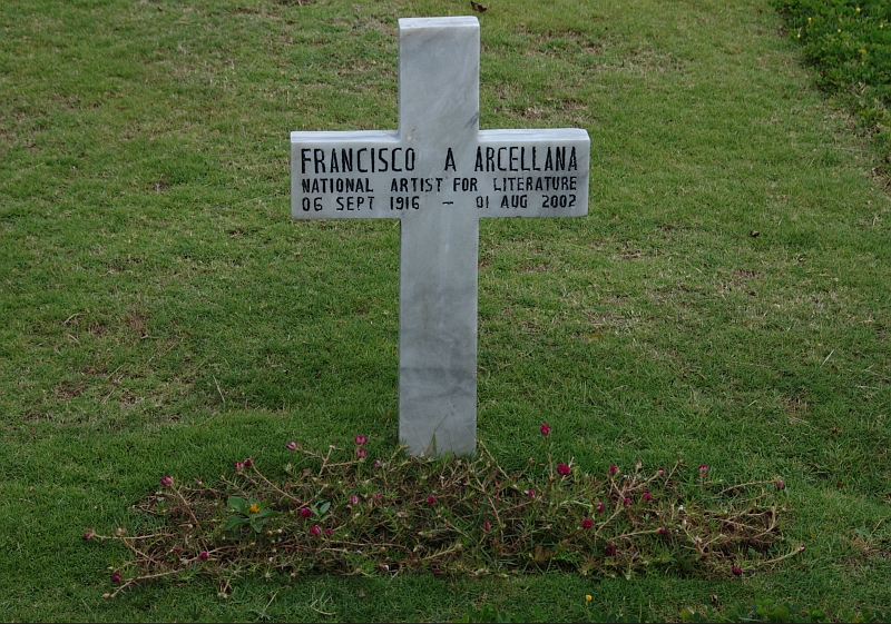 Grave of Filipino writer and National Artist Francisco Arcellana at the Libingan ng mga Bayani